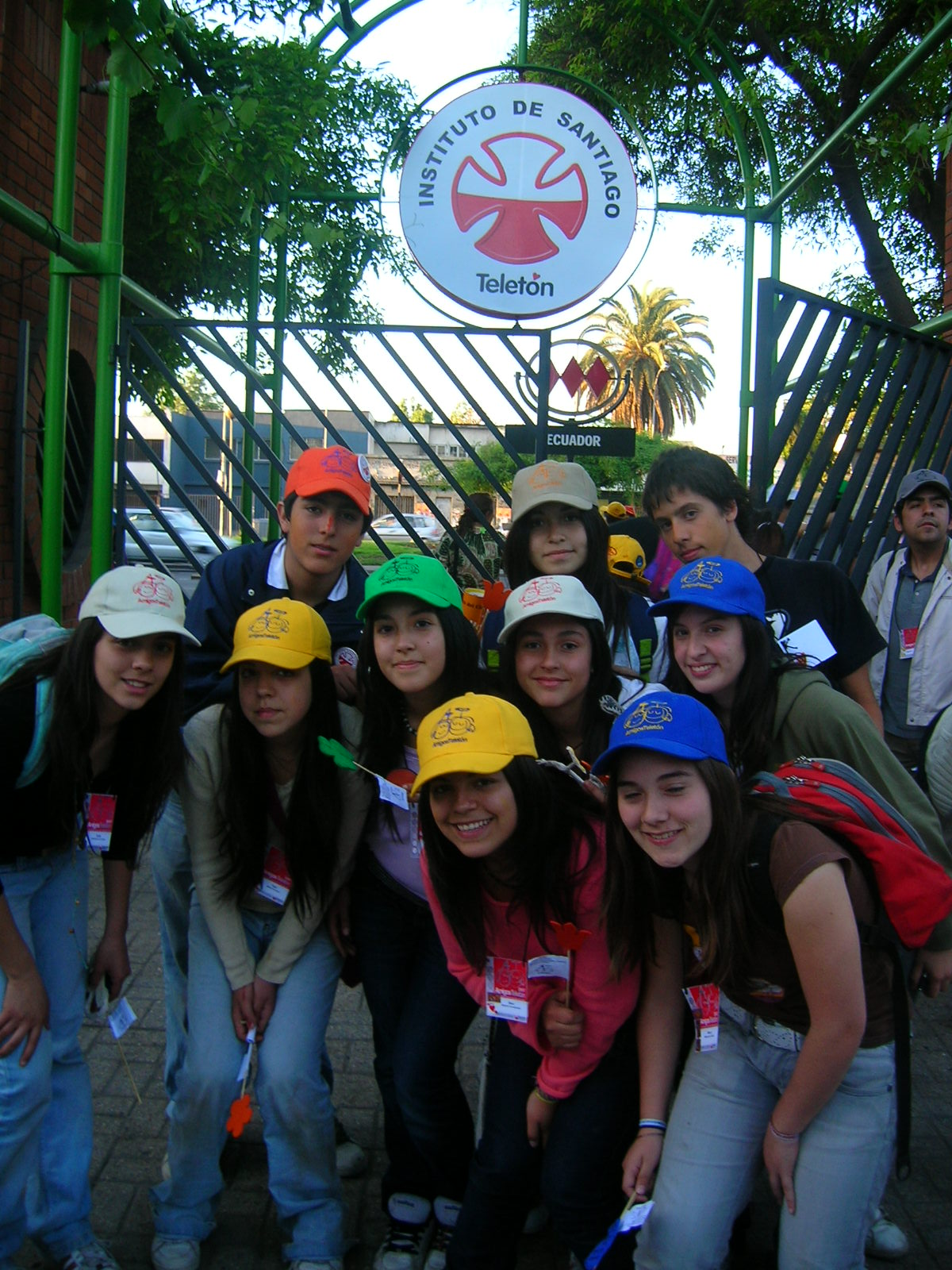 Voluntarios en el Centro de Rehabilitación Infantil de Santiago o Instituto Teletón Santiago, en Santiago de Chile